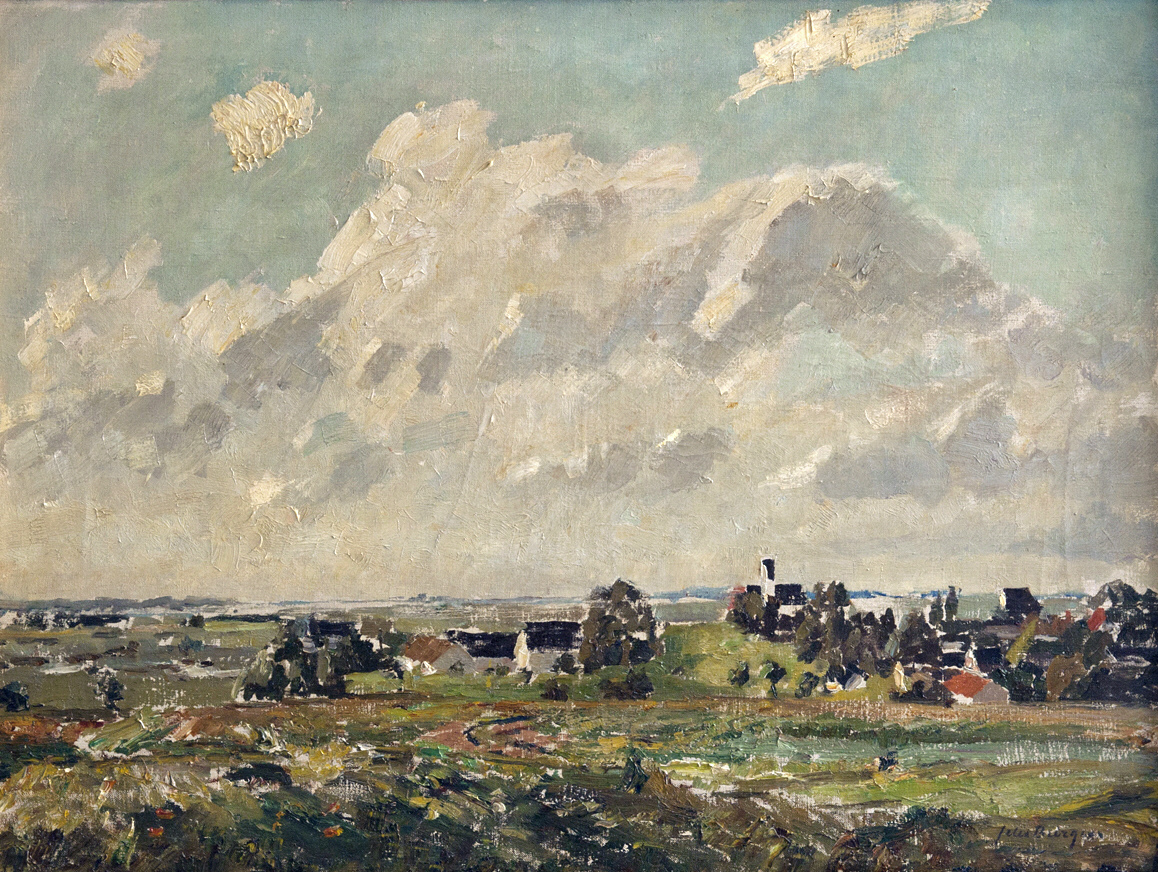 "Früher Morgen" (Originaltitel) in Dachau, ca. 65 x 86,5 cm